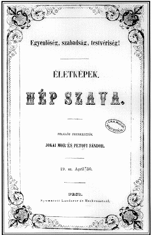 A Magyar Életképek című szépirodalmi folyóiratot Frankenburg Adolf alapította 1843 januárjában. Kezdetben havonként jelent meg, verseket és novellákat közölt. 1844-ben átalakult szabályos irodalmi divatlappá1, neve Életképek-re változott. Ebben az évben már havonként kétszer, végül júliustól 1848 decemberéig -megszűntéig- hetenként jelentkezett. A lap feladatának kezdetben a műveltség terjesztését és irodalmunk népszerűsítését tekintette. Művészeti írásai igényesek, szakszerűek voltak, de kevésbé adtak képet a kor politikai és társadalmi életéről, mint a Honderű és Pesti Divatlap.2 Ez csak az 1845-ös évben változott meg, amikor az Életképek is a politika felé kezdett hajlani. Jelentős eseményt életébe mégis csak egy év múltával a Tízek Társasága ,,írói sztrájk”-ja hozott.